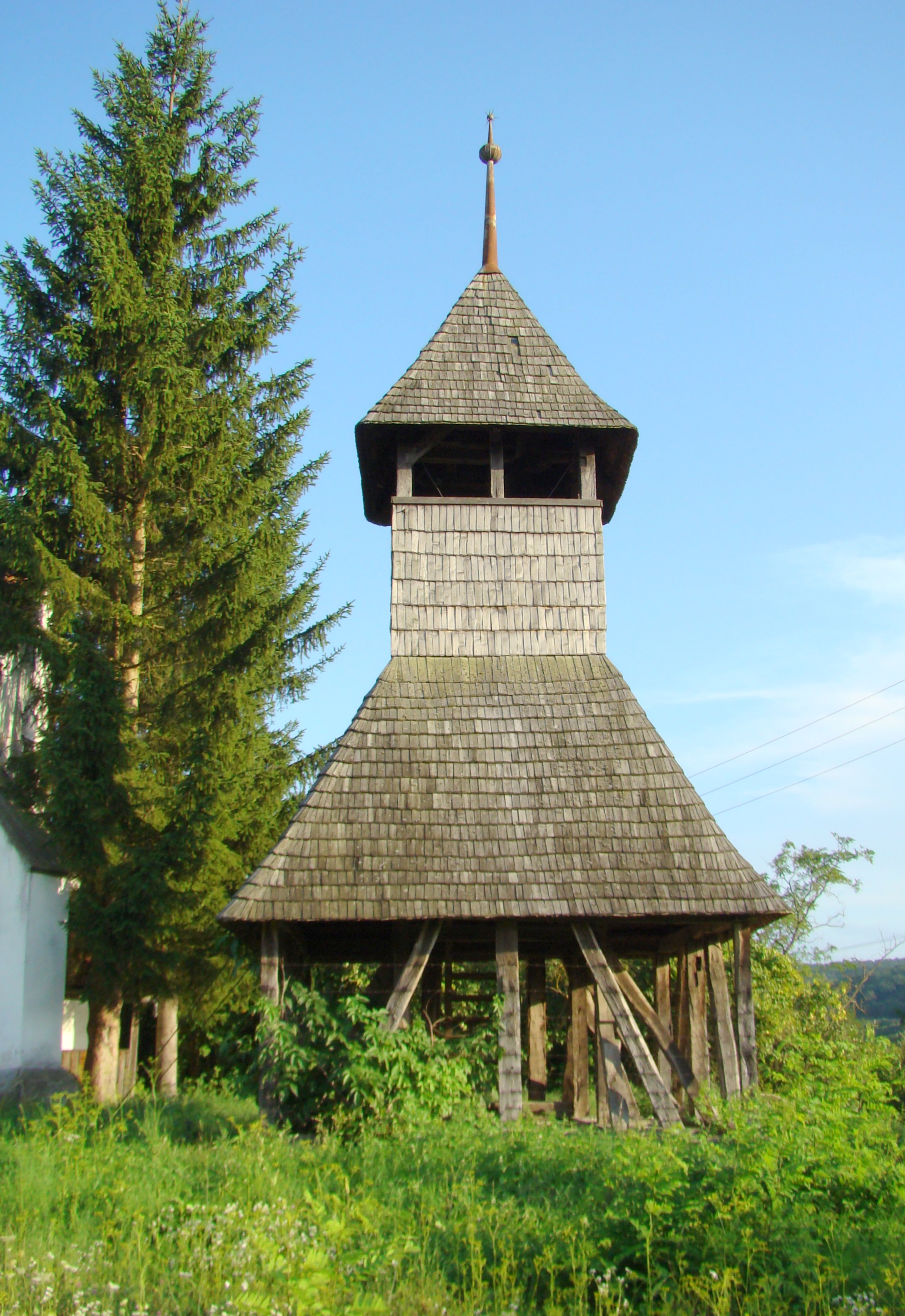 Clopotnița de lemn a bisericii reformate din satul Zimbor; comuna Zimbor, județul Sălaj 02